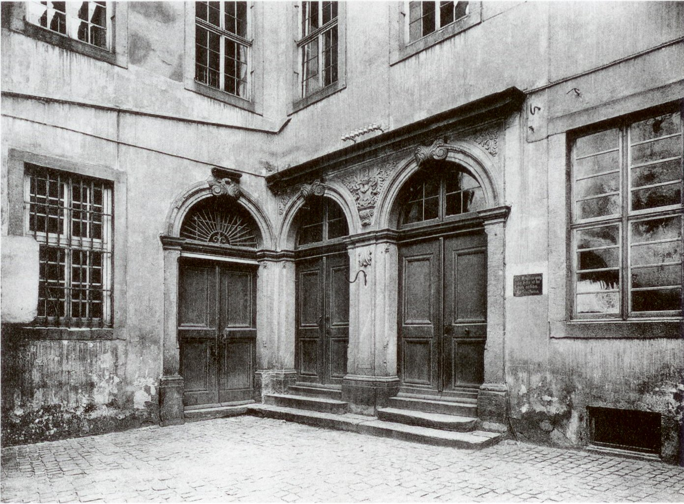 Frankfurt am Main, Germany. Innenhof des Saalhofes um 1900